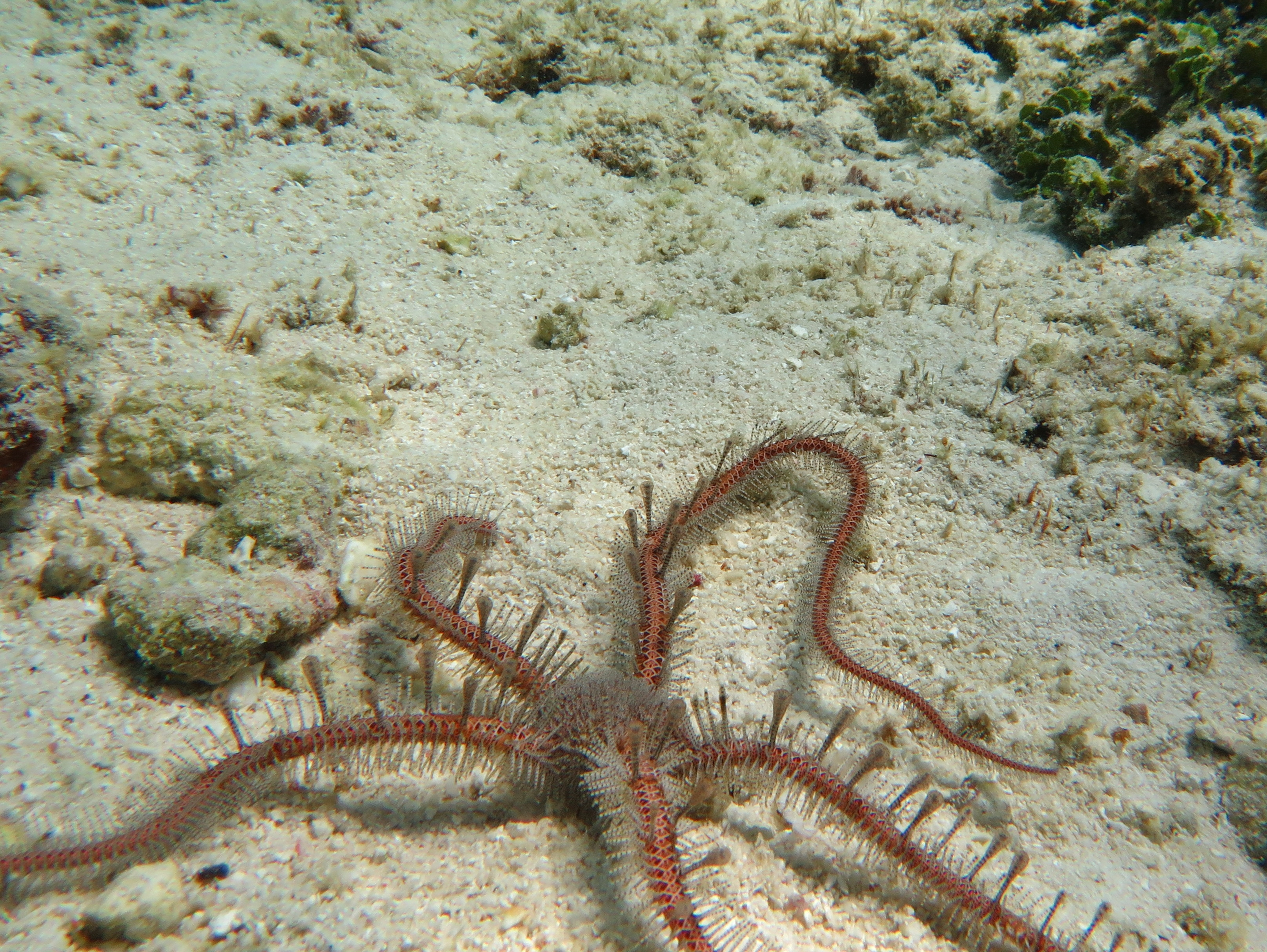 Ophiomastix annulosa aux Maldives (atoll d'Ari).